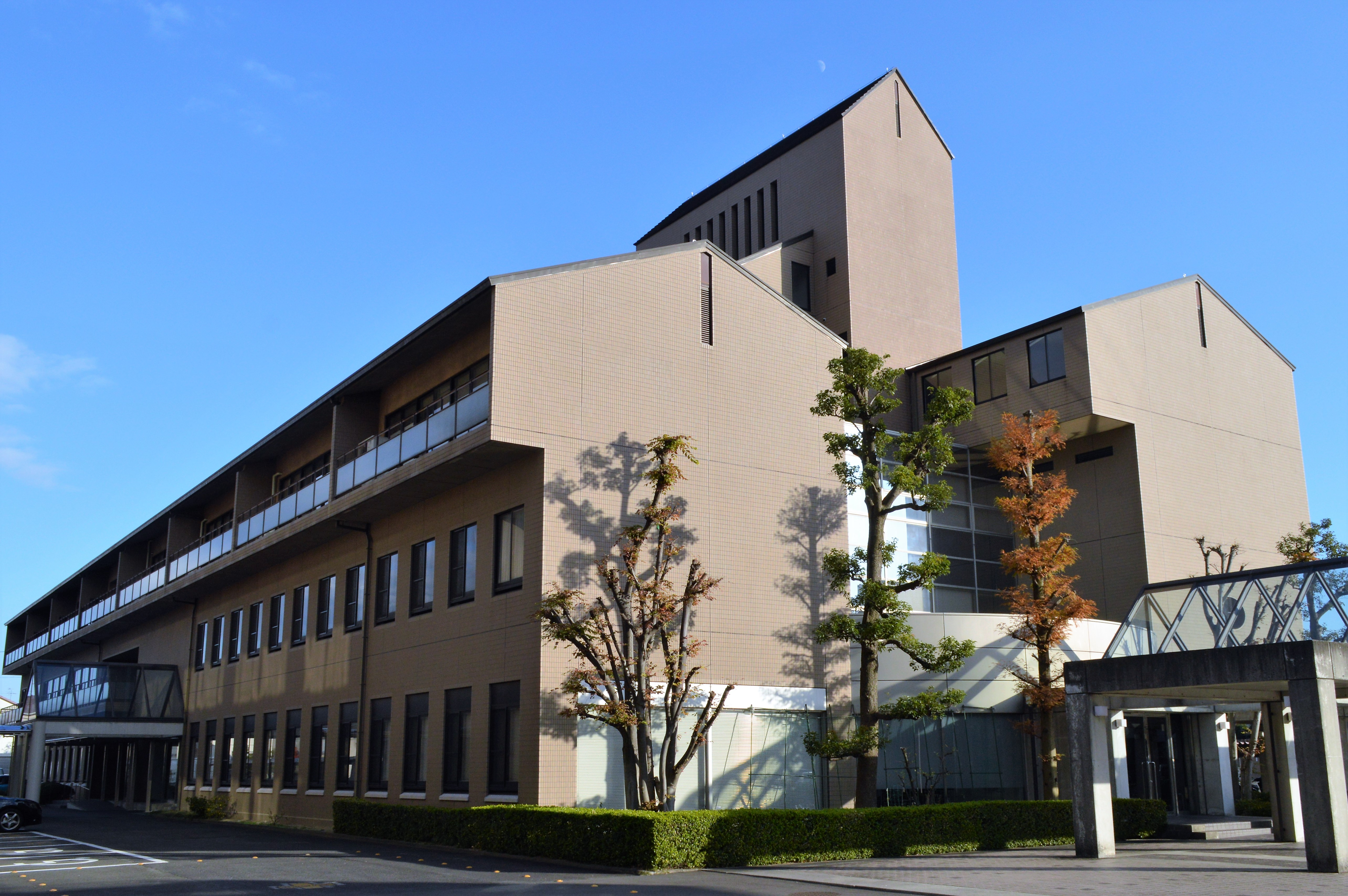 稲沢市の名古屋文理大学本館。